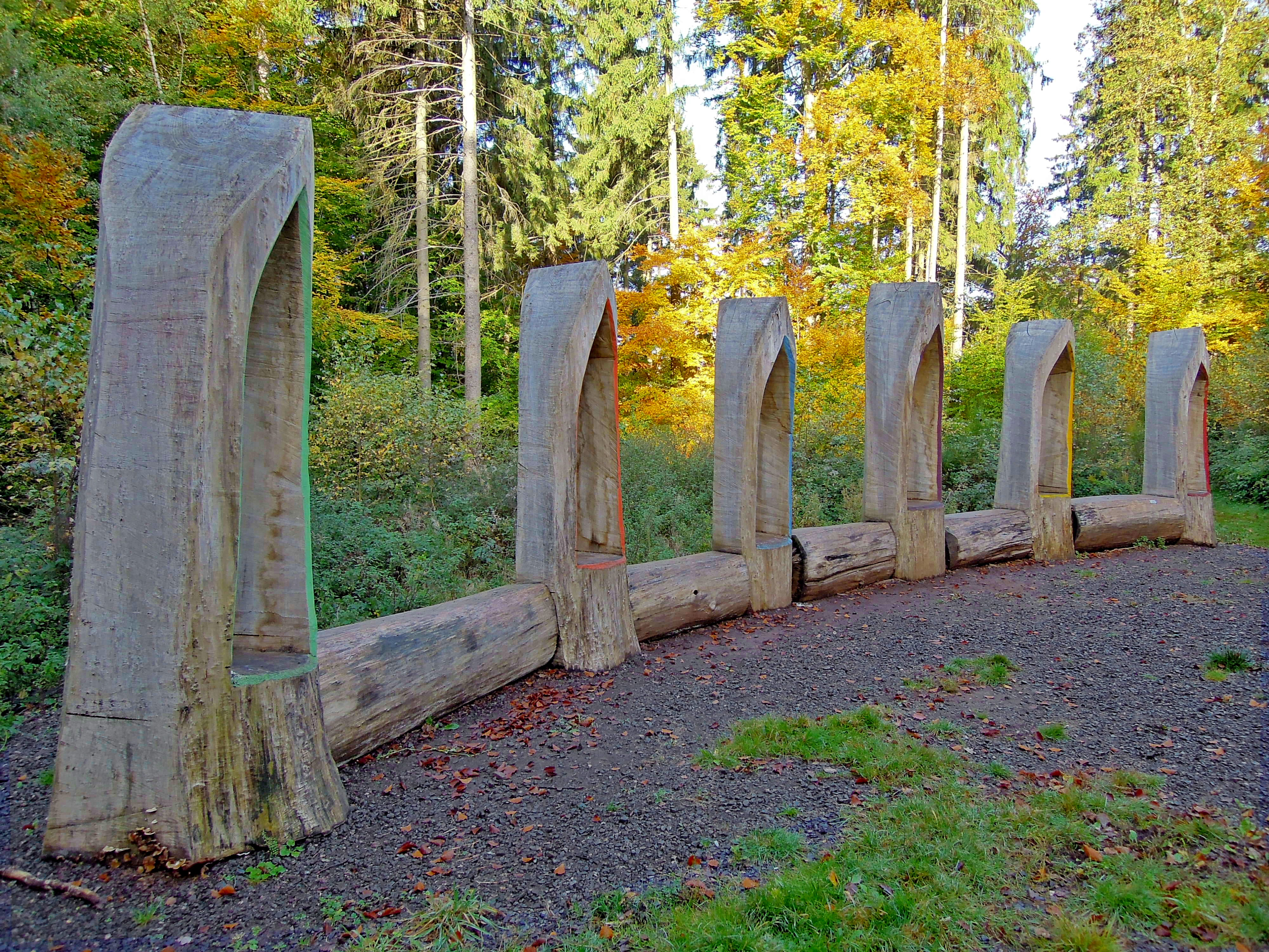 Holzkunst